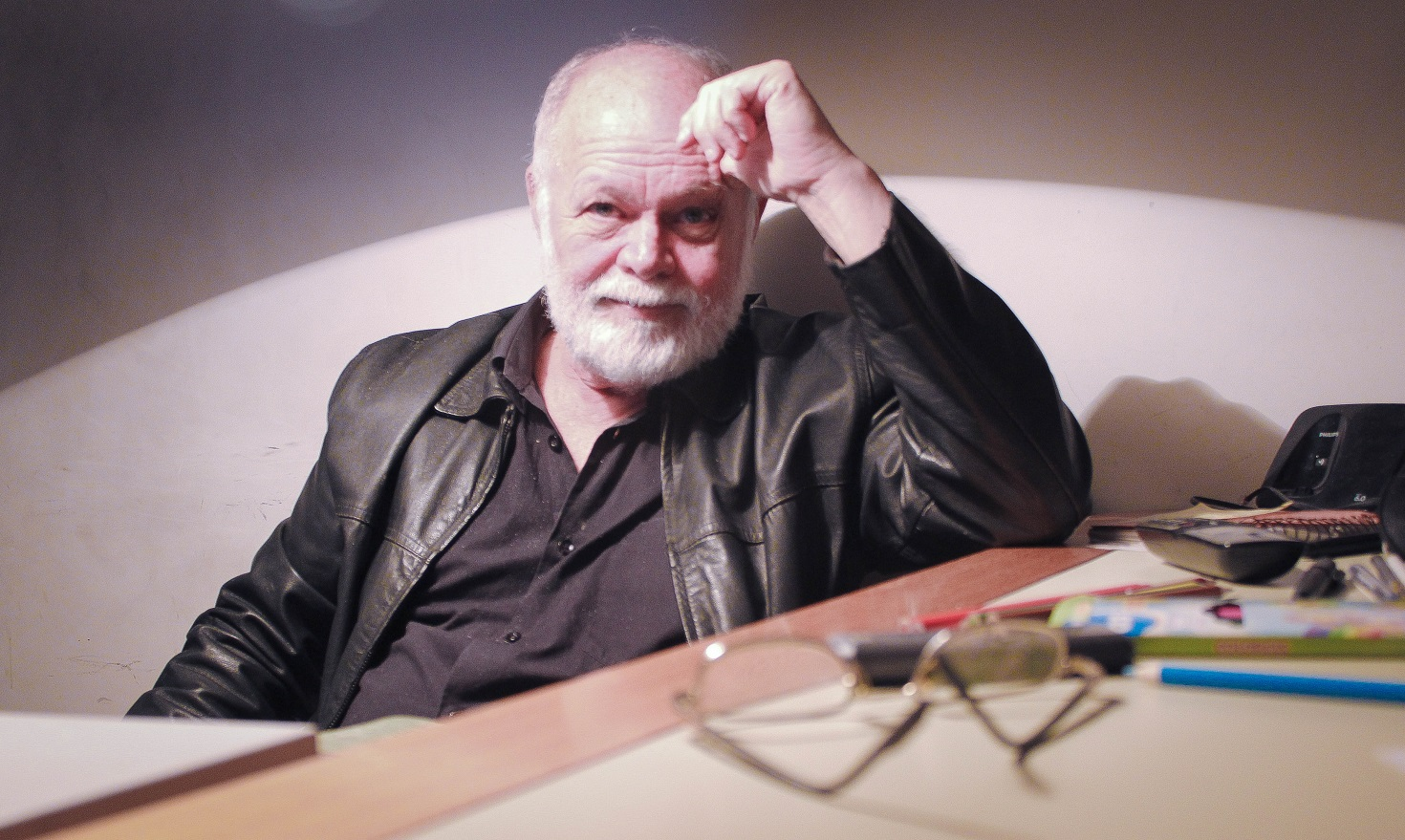 Palmério Dória